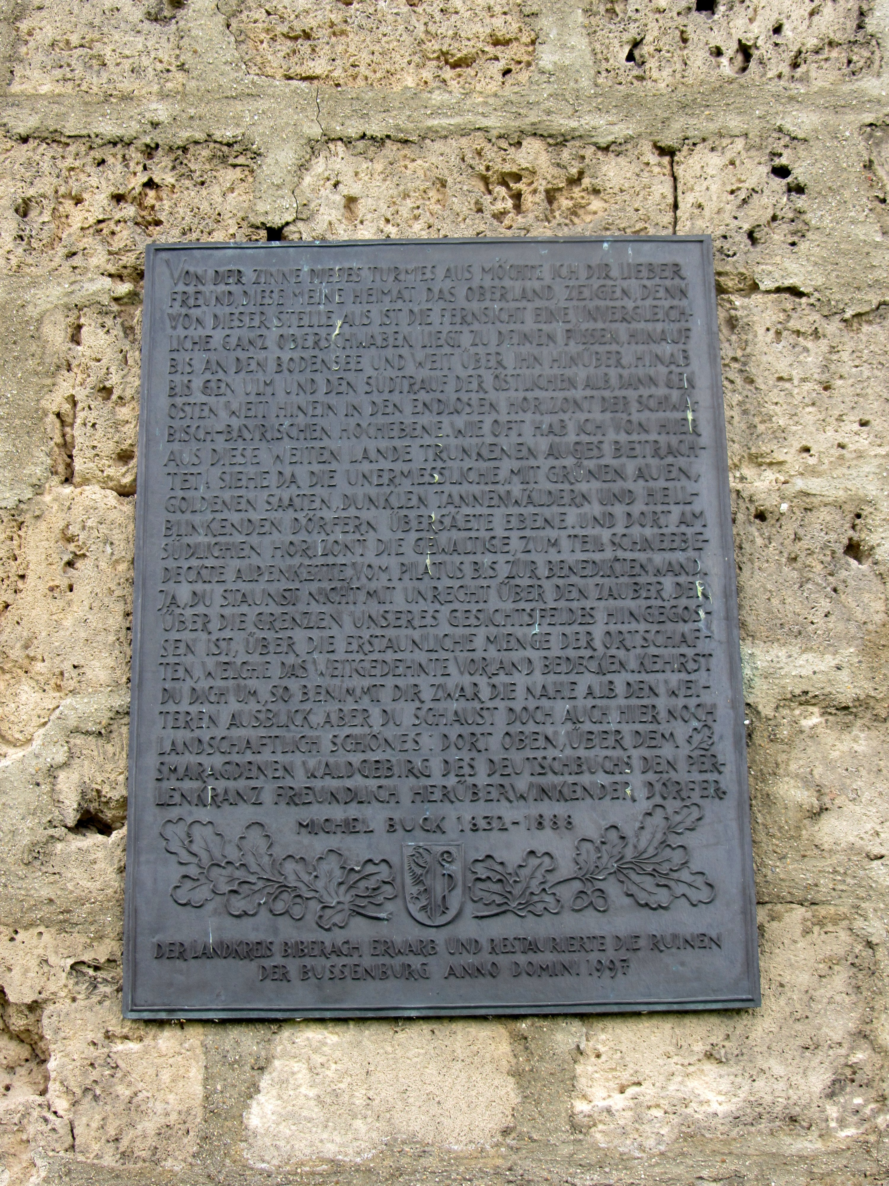 Bussen - Waldburgsche Burg - Tafel mit Text Michael Buck